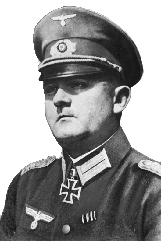 Factual corrections and alternative descriptions are encouraged separately from the original description. Additionally errors can be reported at this page to inform the Bundesarchiv. Original historic description: Dietrich v. Choltitz Oberstleutnant Dietrich von Choltitz, Porträt mit Ritterkreuz (verliehen am 18. Mai 1940) Abgebildete Personen: * Choltitz, Dietrich von: General der Infanterie, Ritterkreuz (RK), Heer, Deutschland (GND 118669281)